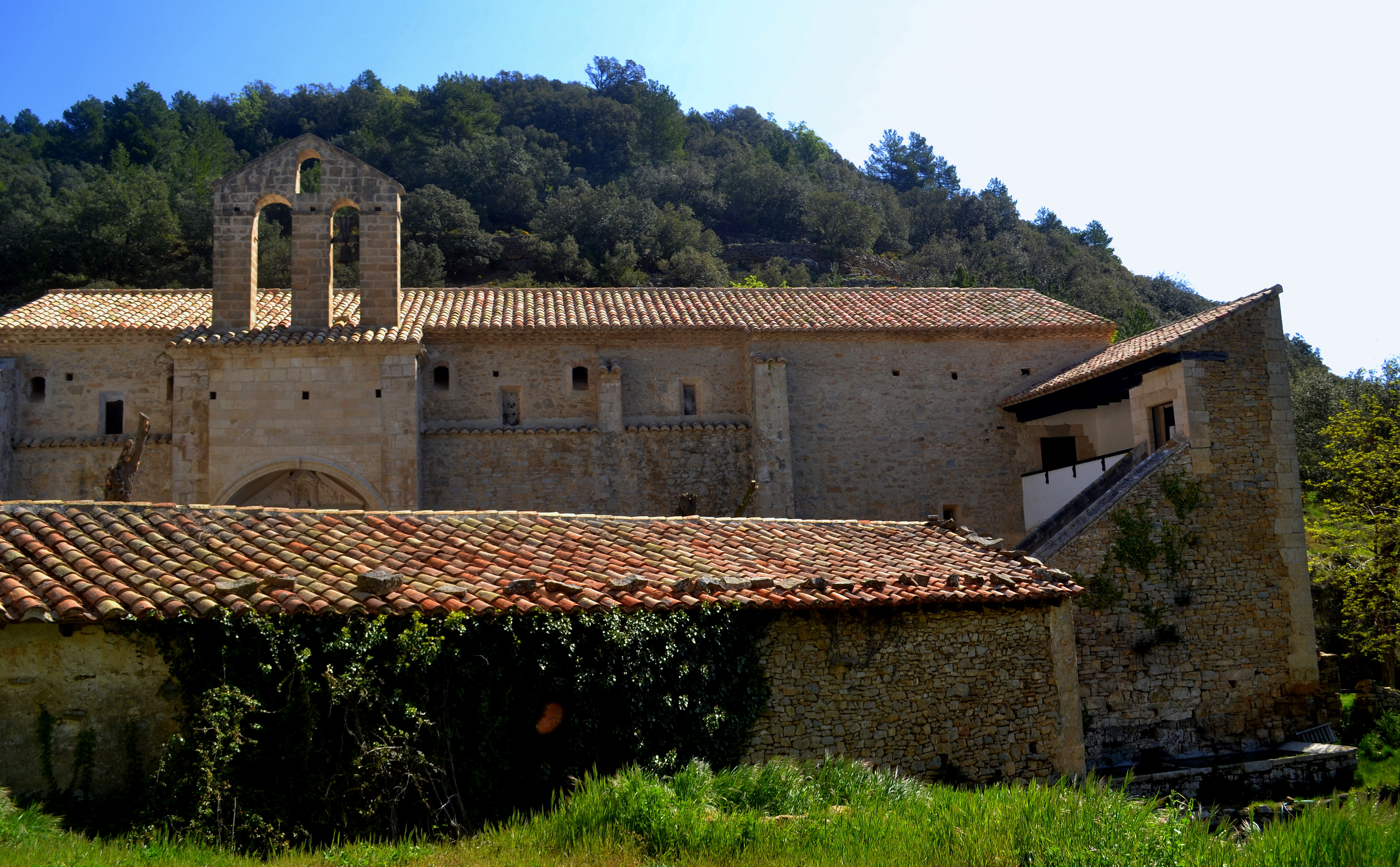 Ermita de la Mare de Déu de la Font (Castellfort)